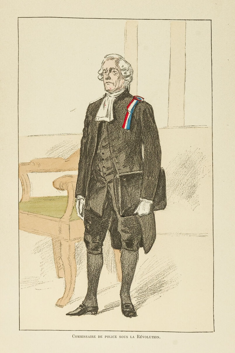 Planche en couleurs "Commissaire de police sous la Révolution". Dimensions : 19 cm x 28 cm. Illustration extraite de l'ouvrage d'Alfred Rey et Louis Féron, Histoire du corps des gardiens de la paix, 1896.